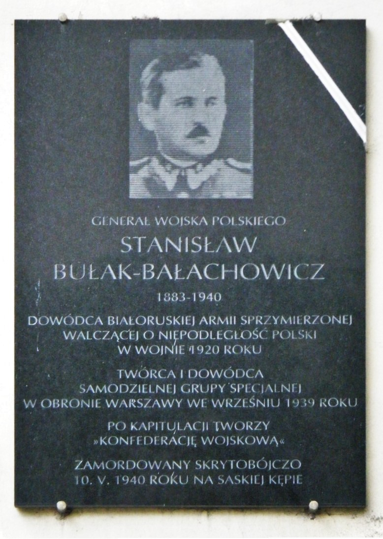 Tablica upamiętniająca gen. Stanisława Bułak-Bałachowicza. Warszawa, Saska Kępa, ul. Paryska 27.